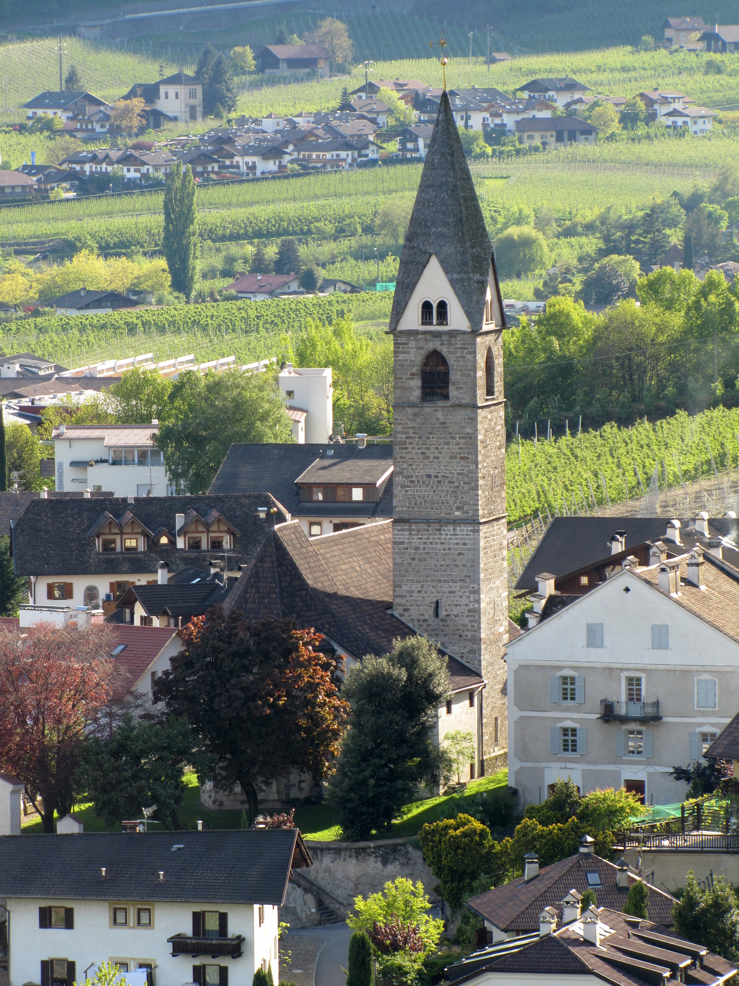 Alte Pfarrkirche St. Hippolyt und St. Erhard in Algund